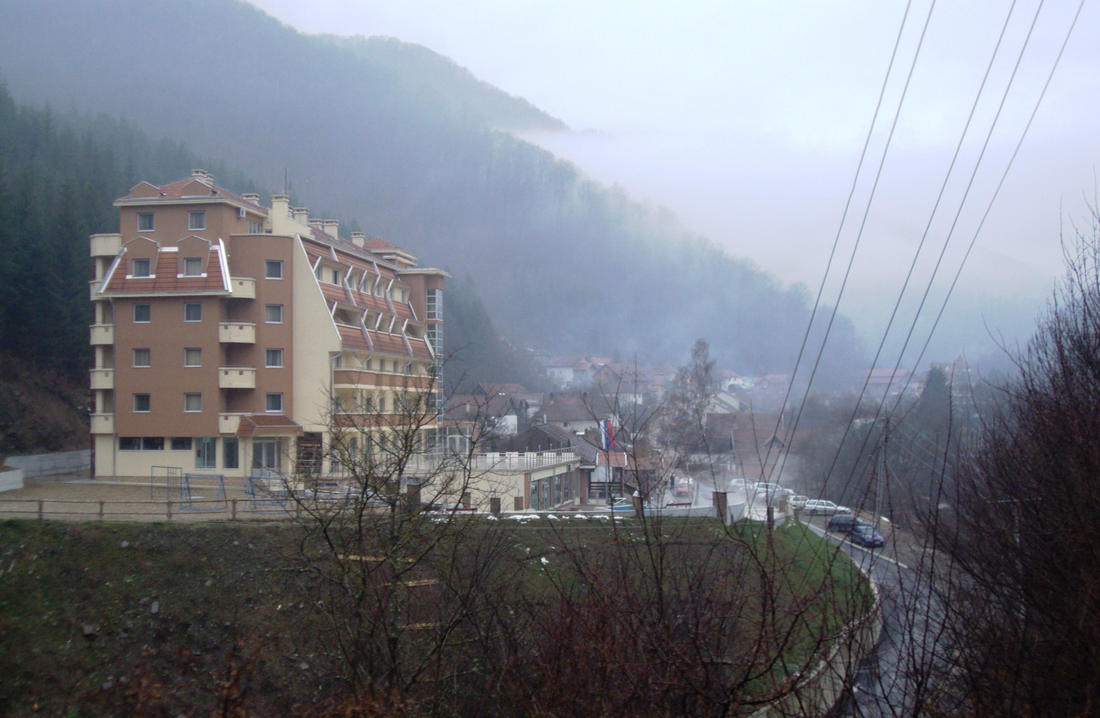 Луково-бања, Куршумлија